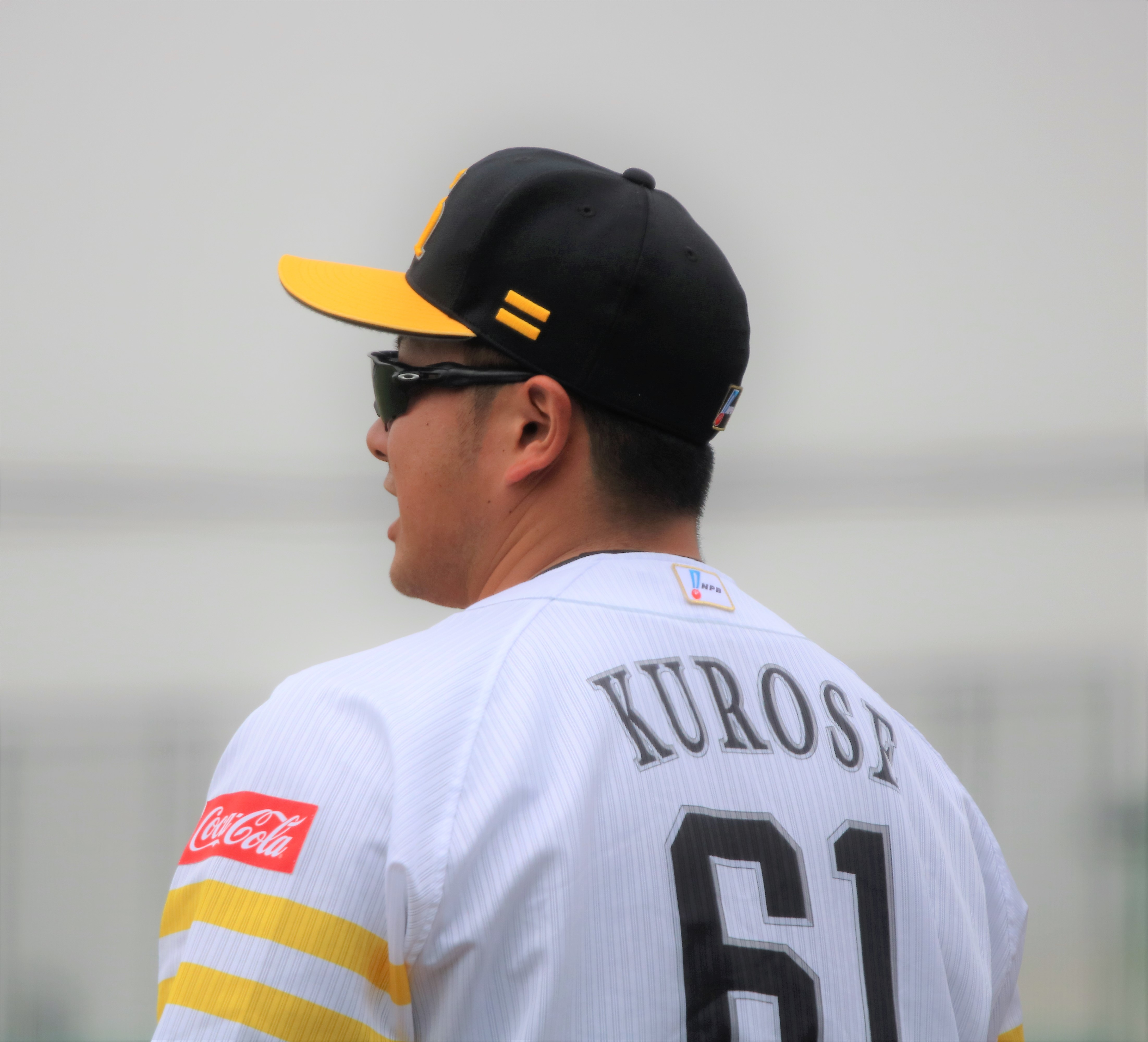 2018/5/1 ウエスタンリーグ